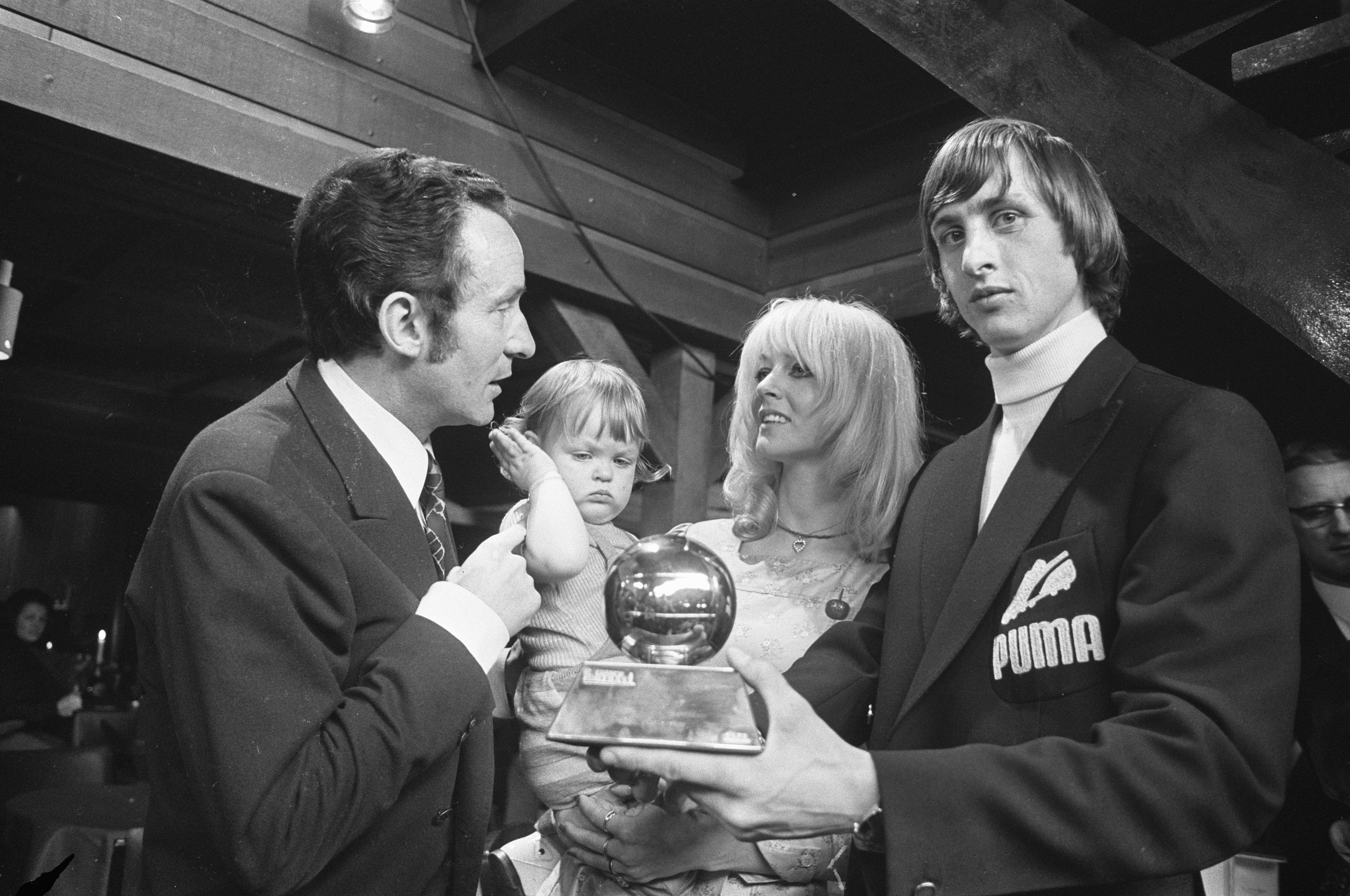 Collectie / Archief : Fotocollectie Anefo Reportage / Serie : [ onbekend ] Beschrijving : Johan Cruijff krijgt in Amstelveen "Ballon dor" (onderscheiding voor Europees voetballer van het jaar) van Max Urini (l), chef red. France Football / Datum : 13 april 1972 Locatie : Amstelveen, Noord-Holland Trefwoorden : onderscheidingen, sport, voetballers Persoonsnaam : Cruijff, Johan Fotograaf : Verhoeff, Bert / Anefo Auteursrechthebbende : Nationaal Archief Materiaalsoort : Negatief (zwart/wit) Nummer archiefinventaris : bekijk toegang 2.24.01.05 Bestanddeelnummer : 925-5239